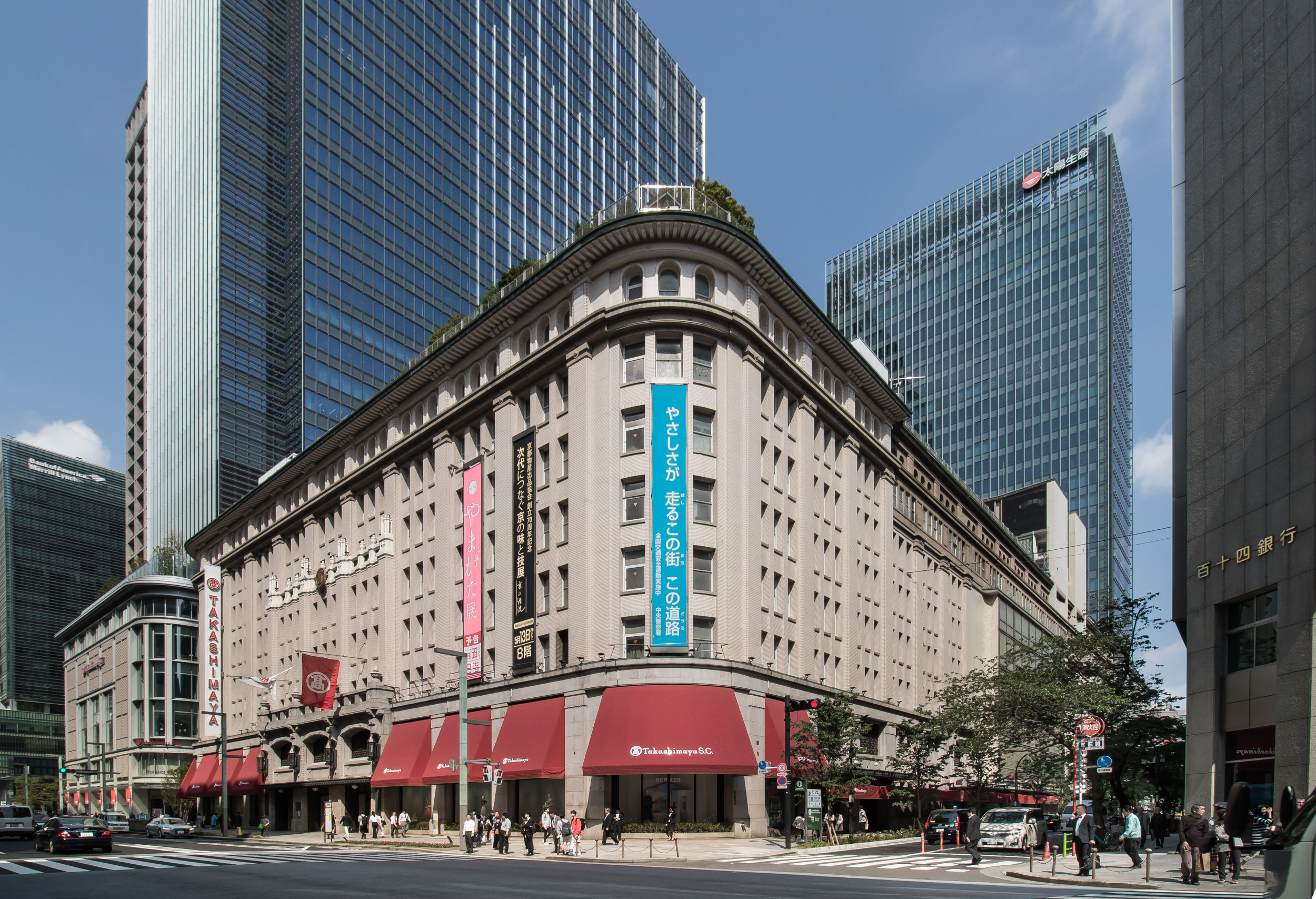 日本橋高島屋、東京都中央区、高橋貞太郎設計、1933年。重要文化財。